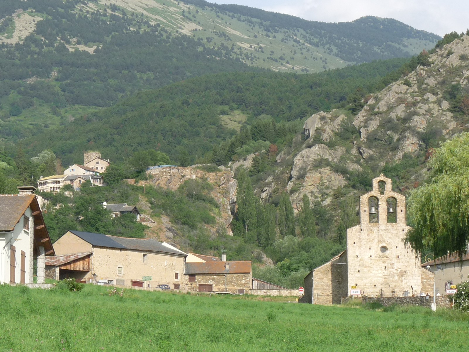 Llo, Pyrénées-Orientales, France